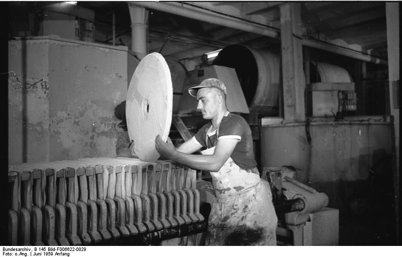 Selb/Bayern Porzellan-Manufaktur Fa. Heinrich Ausschnitt aus der Masseaufbereitung (Massemühle) In den Filterpressen wird aus dem "Gießschlicker" (zähflüssige Porzellanmasse, bestehend aus Kaolin, Feldspat und Quarz) das Wasser herausgepresst. Nach dem Pressvorgang, der etwa 40 bis 45 Minuten dauert, werden die "Massekuchen" aus den Pressen herausgehoben. 8. Juni - 12. Juni 1959